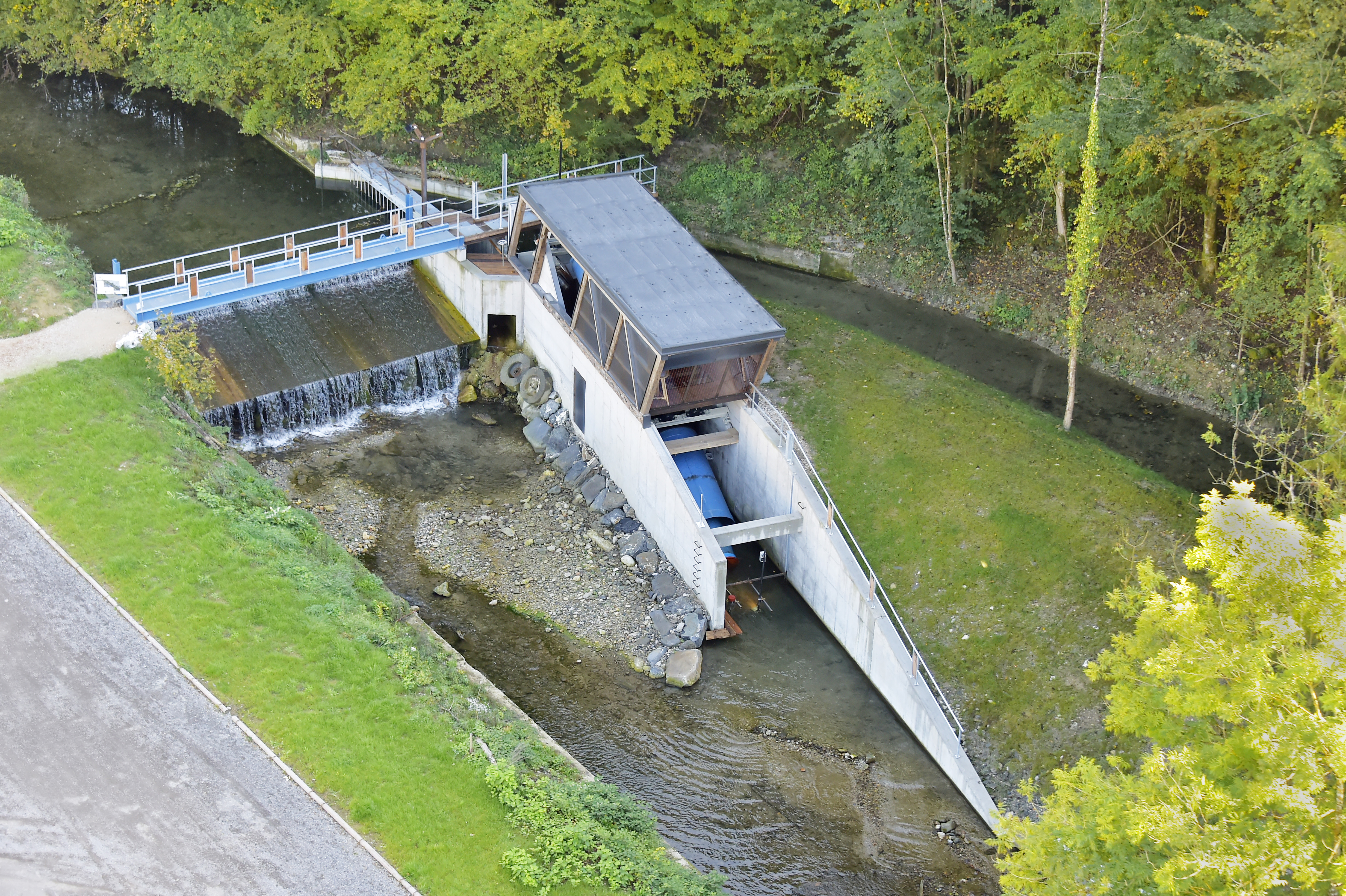 Patentierte Hydroconnect Drehrohr-Doppel-Wasserkraftschnecke mit Fischlift in der Jeßnitz